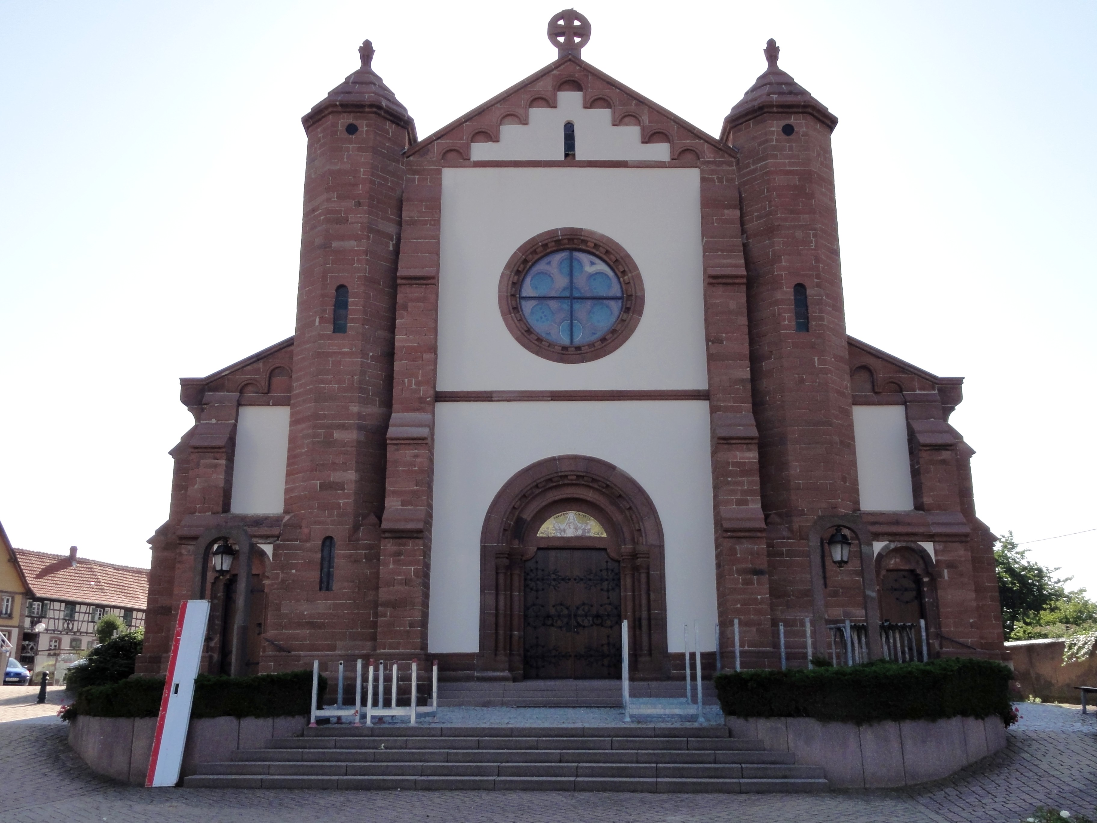 Alsace, Bas-Rhin, Église Saint-Cyriaque de Dauendorf (IA00061624).